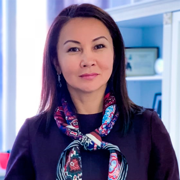 Лаззат Танысбай